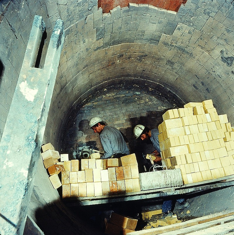 Original image description from the Deutsche FotothekFeuerungs- und Industrieofenbauer